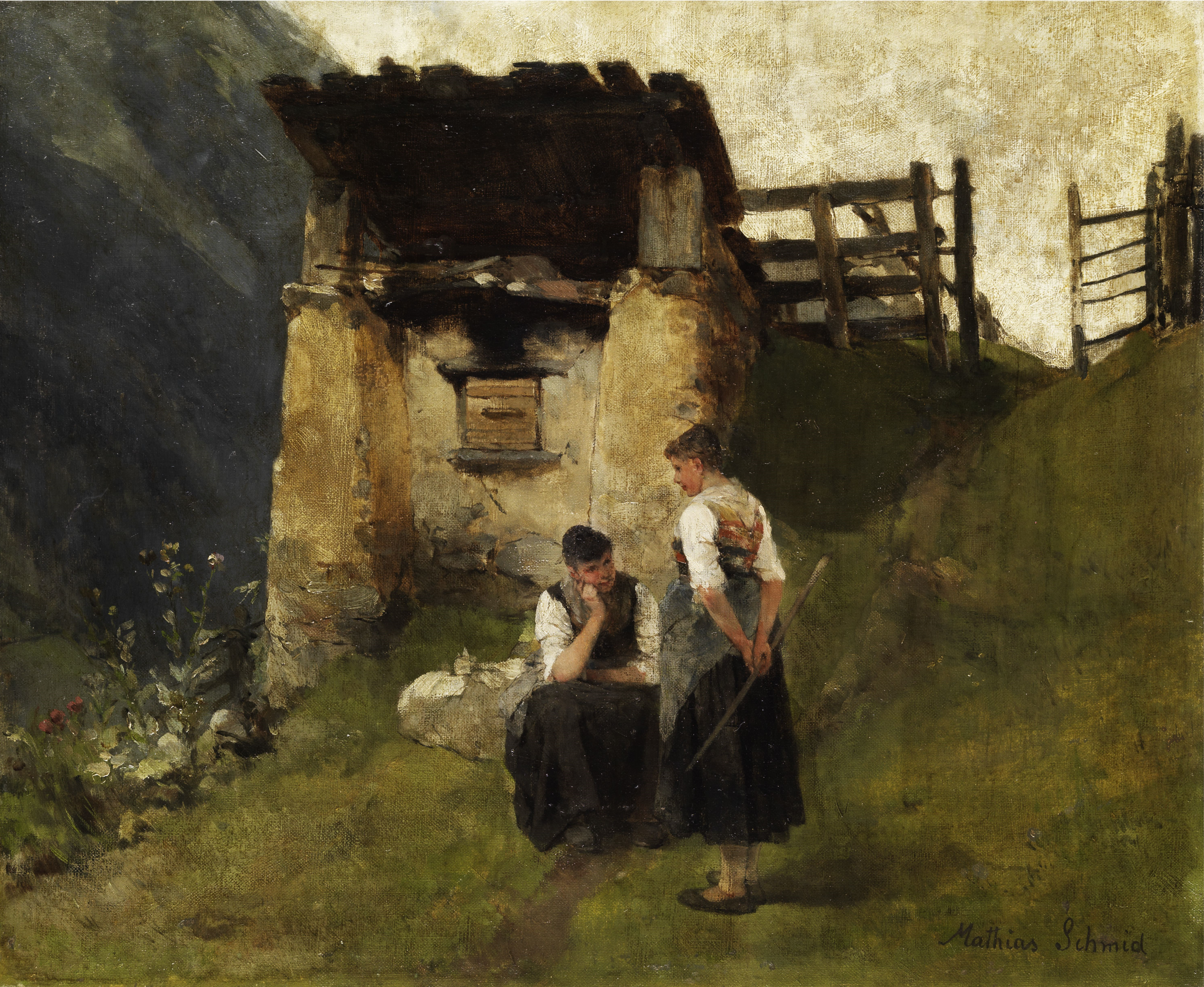 Bauernmädchen in den Alpen an einem Köhlerofen